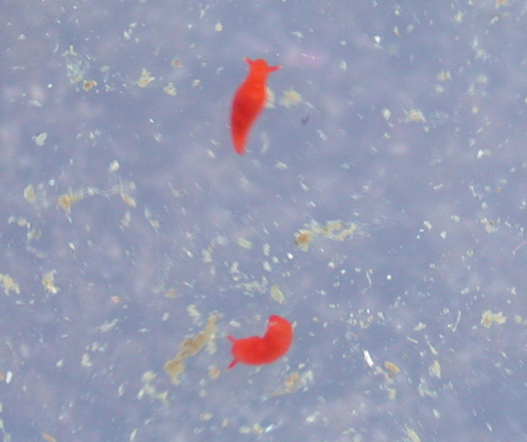 Vayssierea elegans：オカダウミウシ 2004/06/18 和歌山県田辺市：Tanabe city, Wakayama Pref. Japan